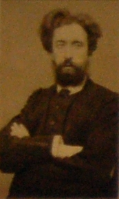 François Jourde, membre de la Commune de Paris (1871)